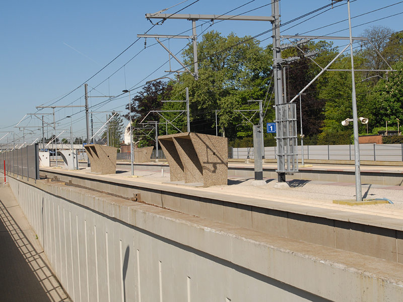 Station Kortenberg